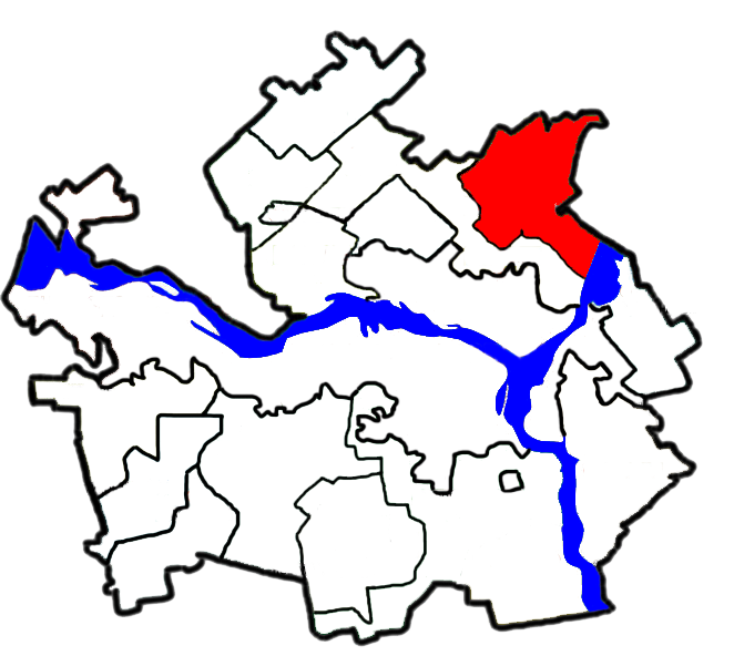 Підгороднянська міська рада